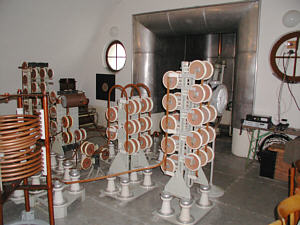 Große Kondensatoren im Rundfunksender